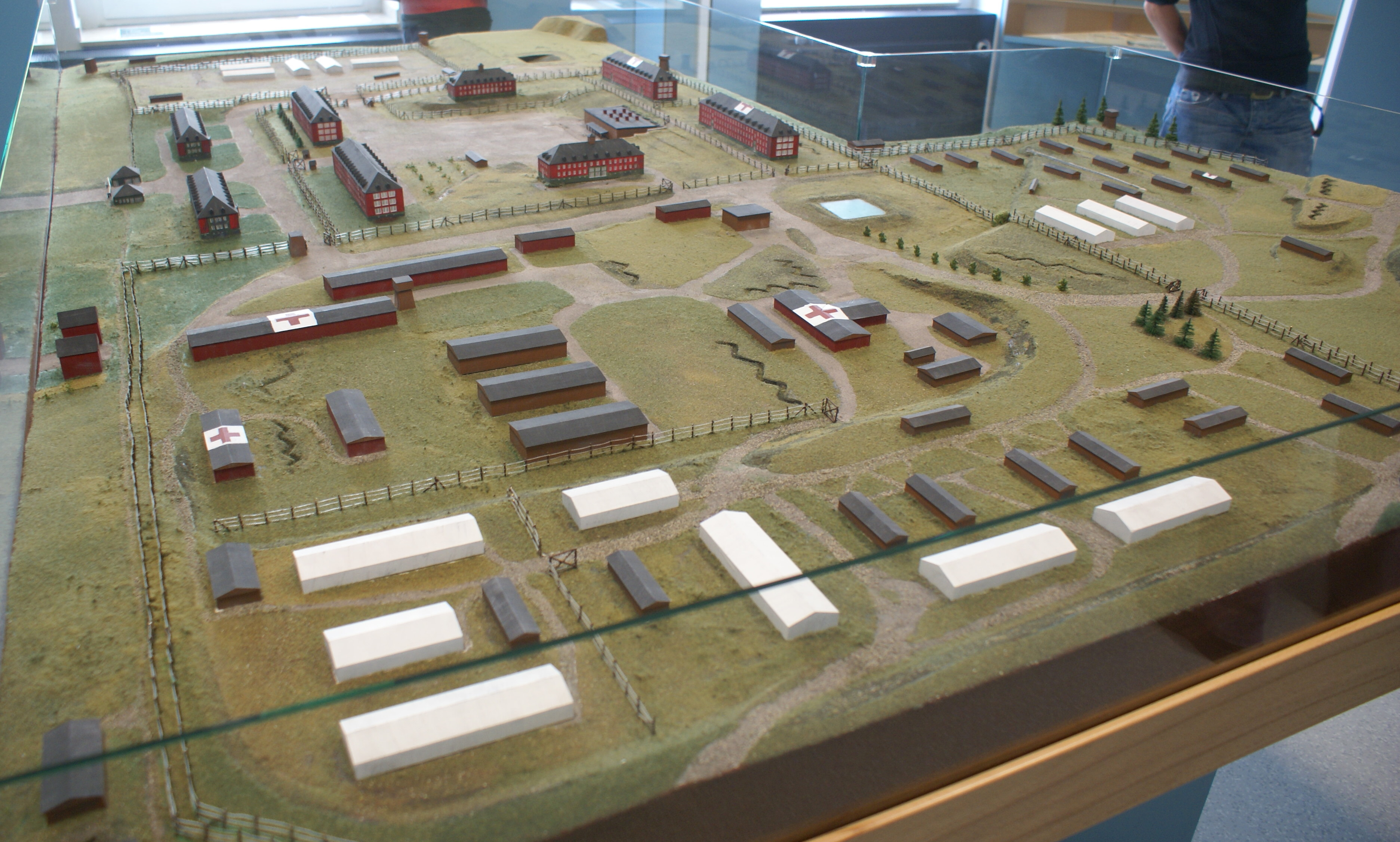 Modell des Stammlagers VI A in der Gedenkstätte auf der Landesgartenschau Hemer